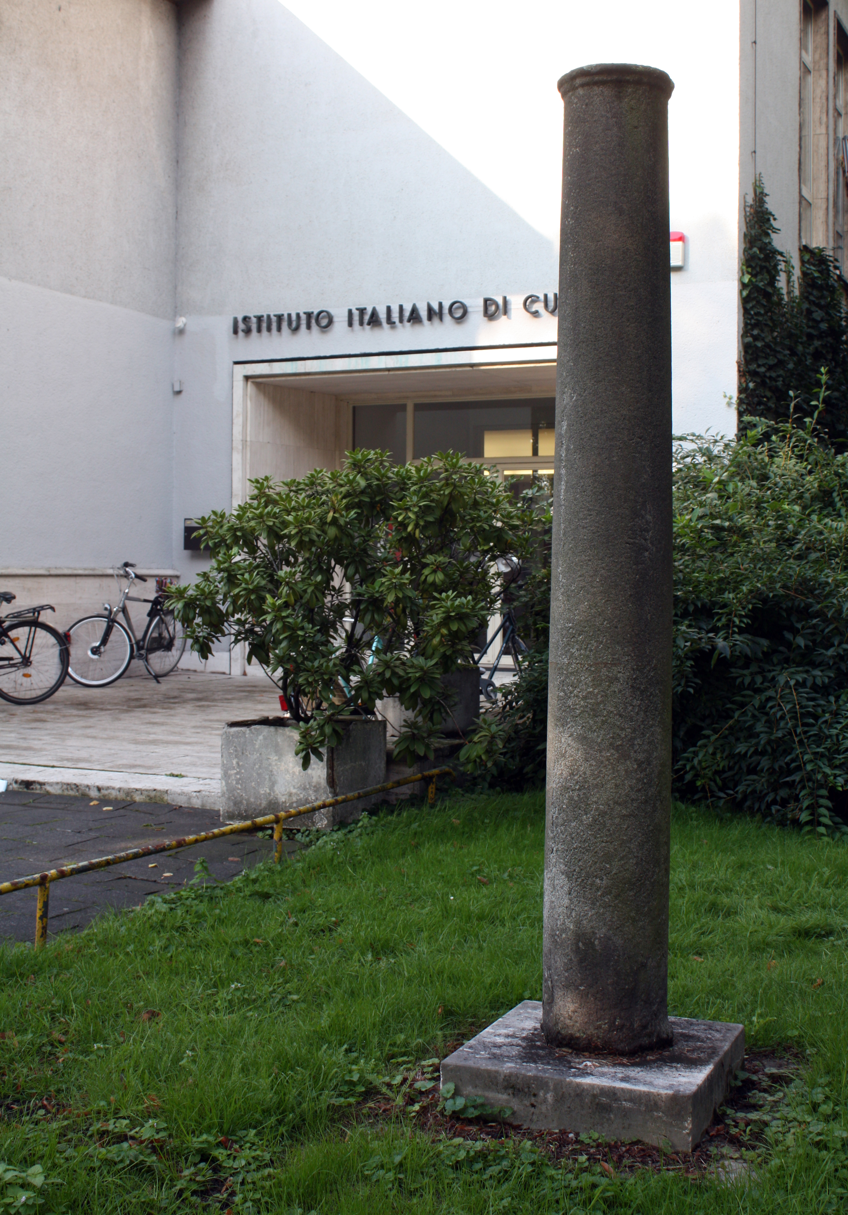 Italienisches Konsulat und Kulturinstitut, Köln